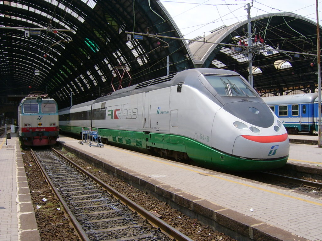 ETR 500